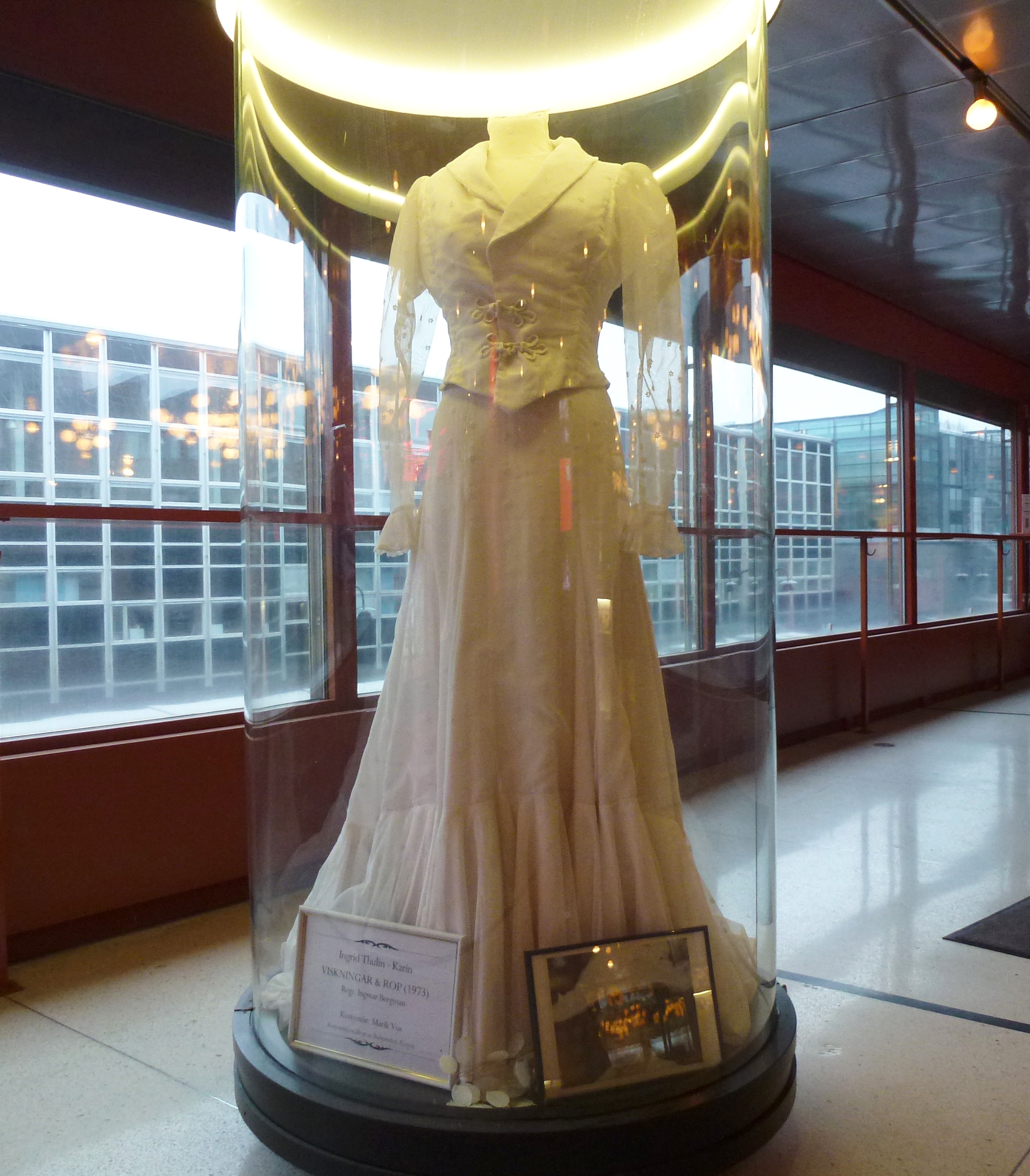 Ingrid Thulins klänning i filmen "Viskningar och rop" (1973)